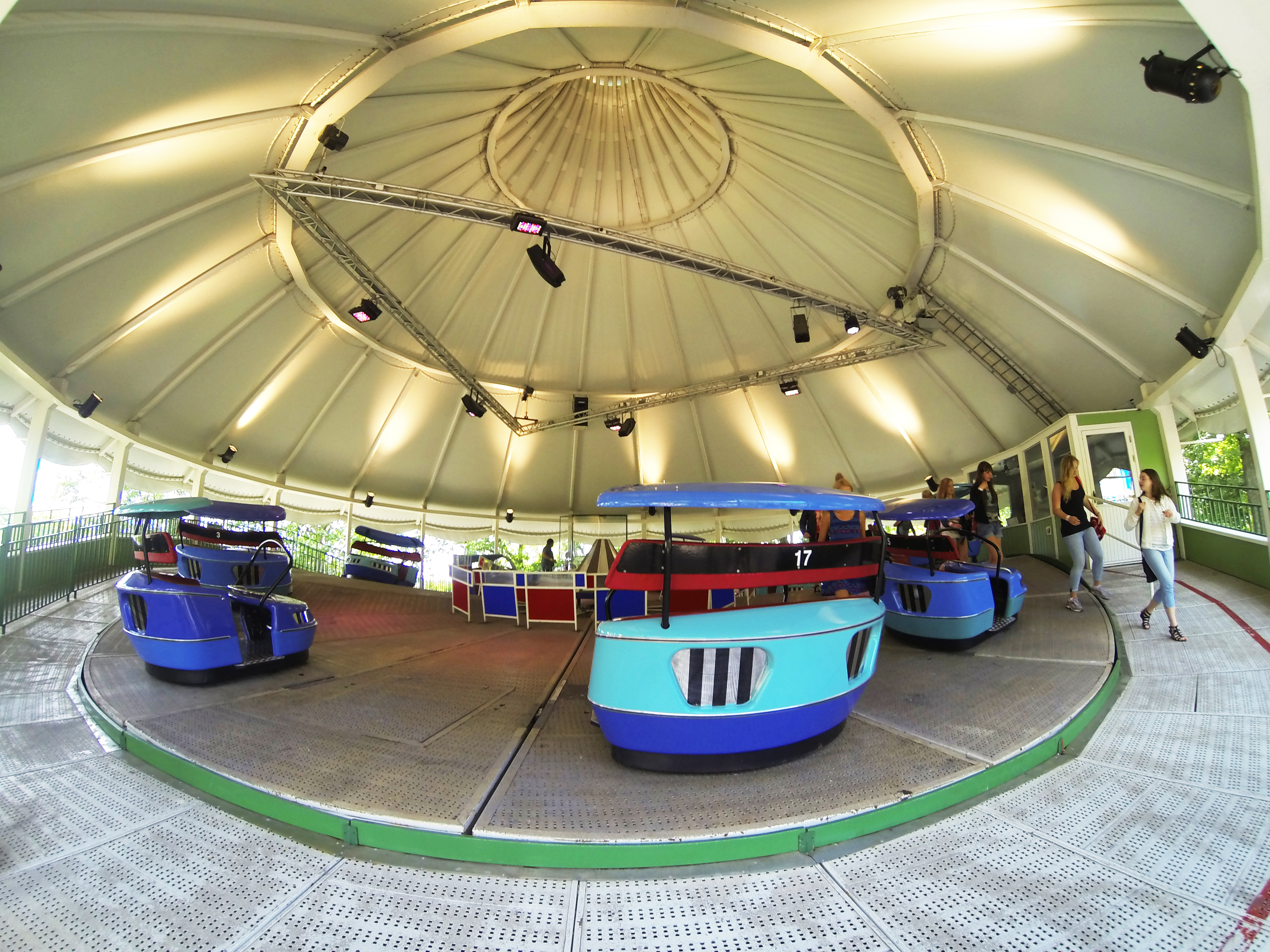 Åkattraktionen Vivelvinden på Liseberg.